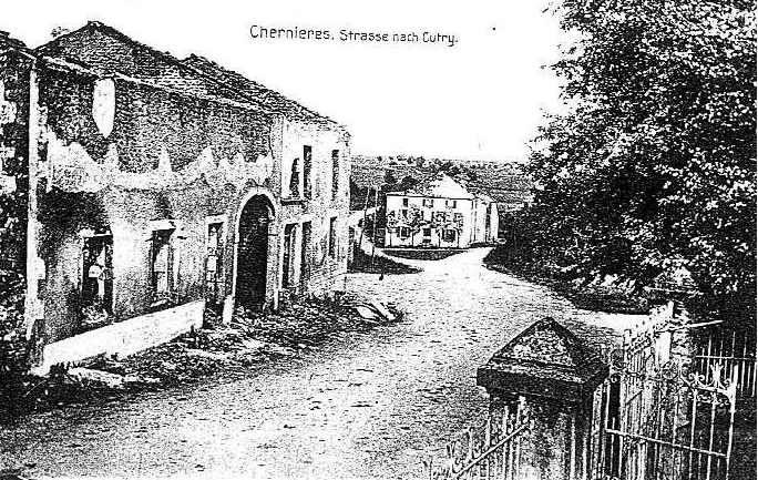 Carte postal Allemande de Chénières